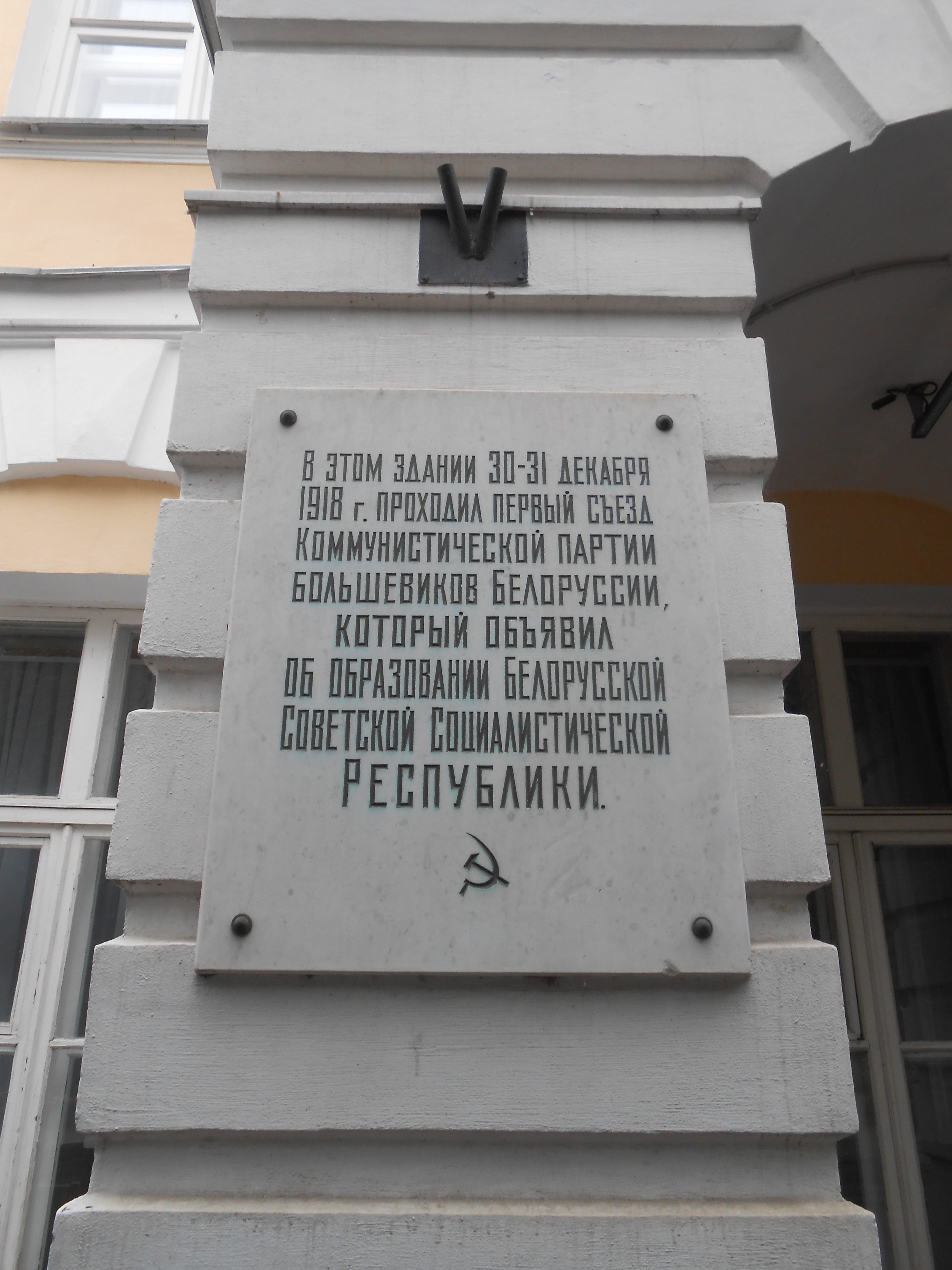 Дом Дворянского собрания (Дом, в котором 30-31 декабря 1918 года проходил I съезд Компартии Белоруссии, провозгласивший создание Белорусской социалистической Республики): улица Глинки, 3, Смоленск, Смоленский район, Смоленская область